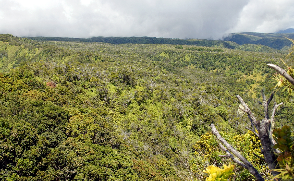 Иллюстрация для викиучебника Гавайеведение